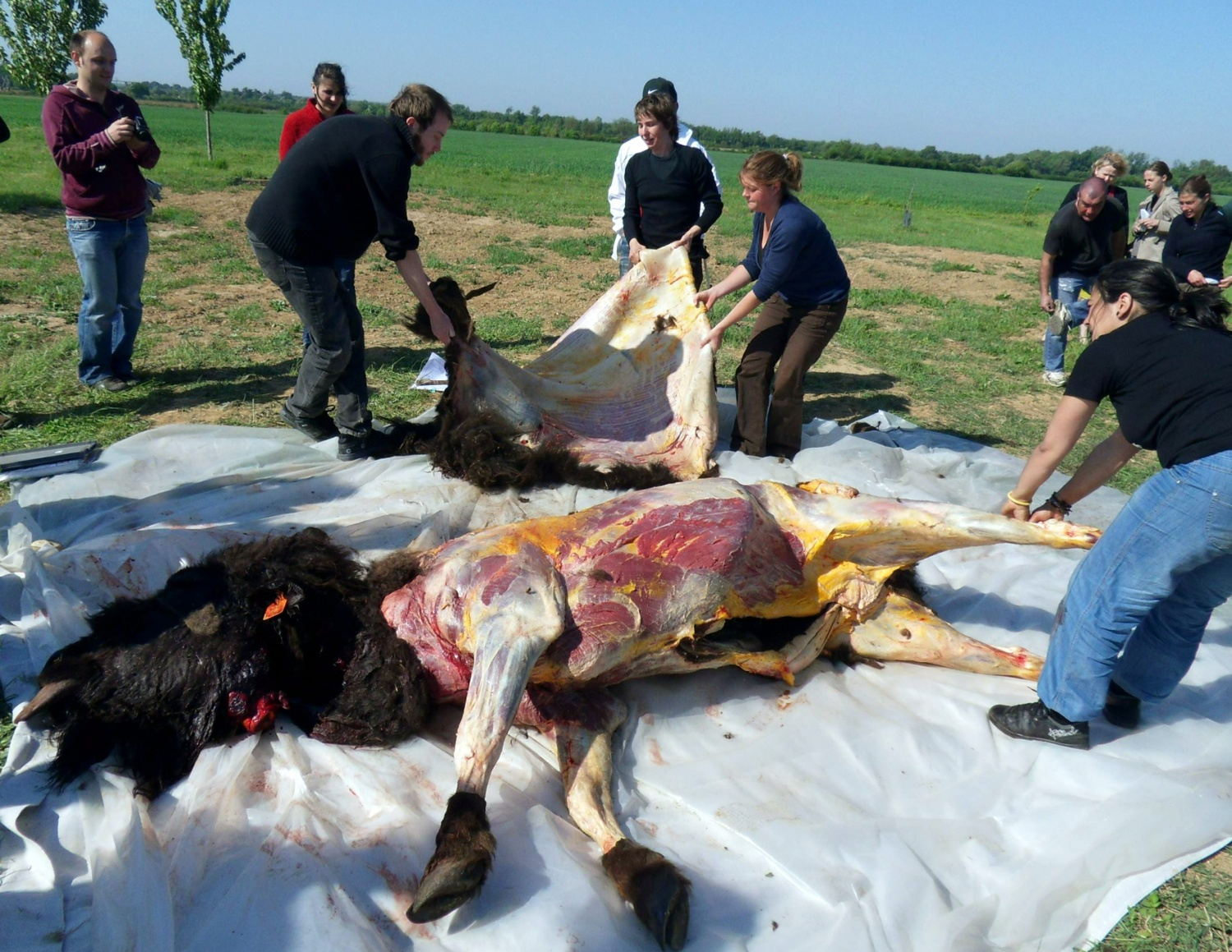 Expérience de découpe de bison avec des répliques d'outils de pierre taillée utilisés par les hommes de Néandertal, PCR « des Traces et des Hommes », avril 2011